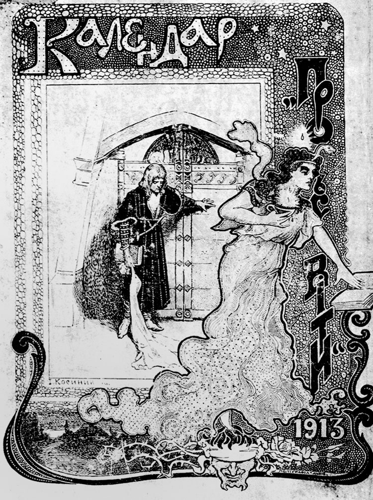 І. Косинін